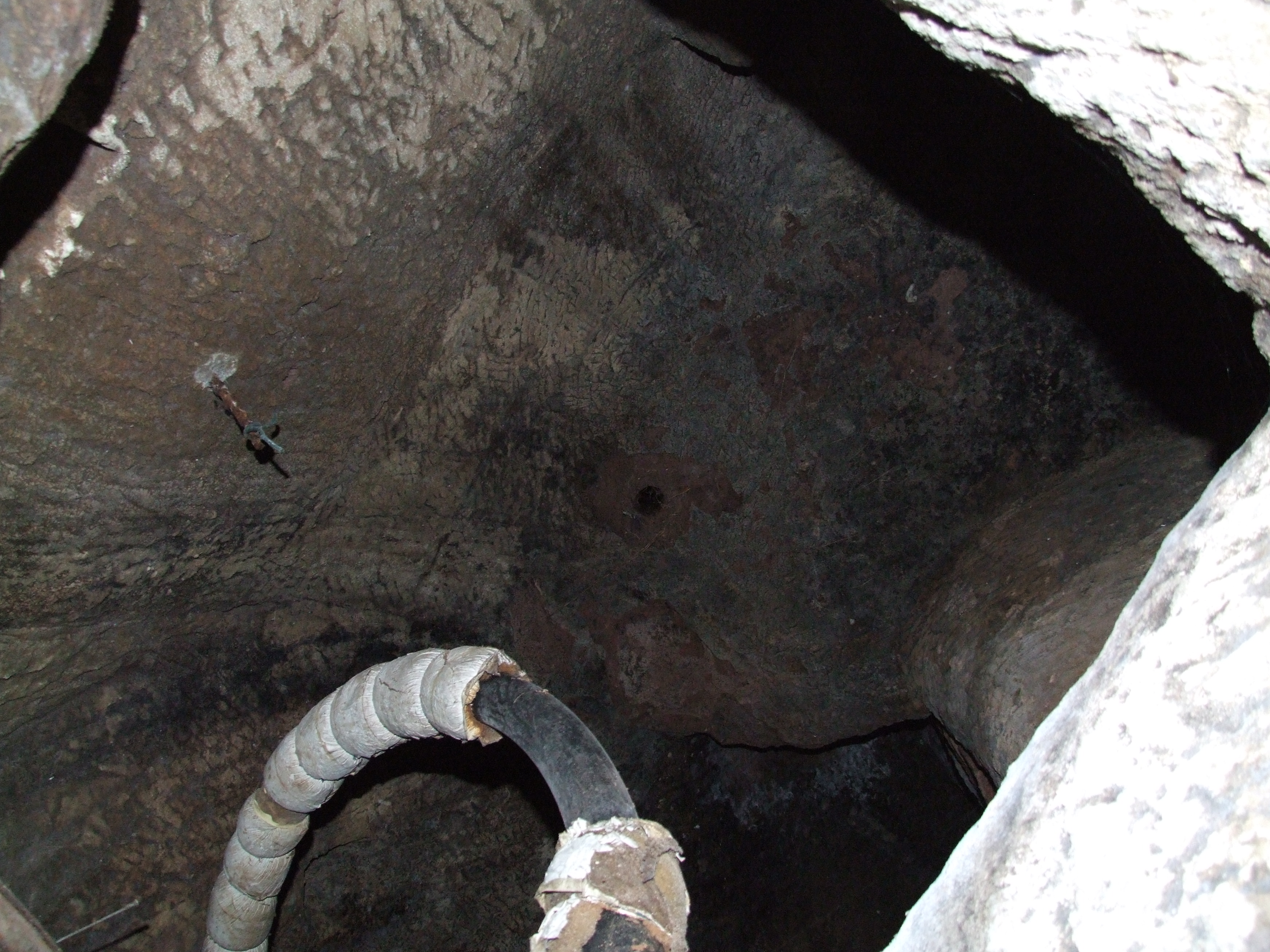 Aufgang im unterirdischen Gang der Burg Berwartstein